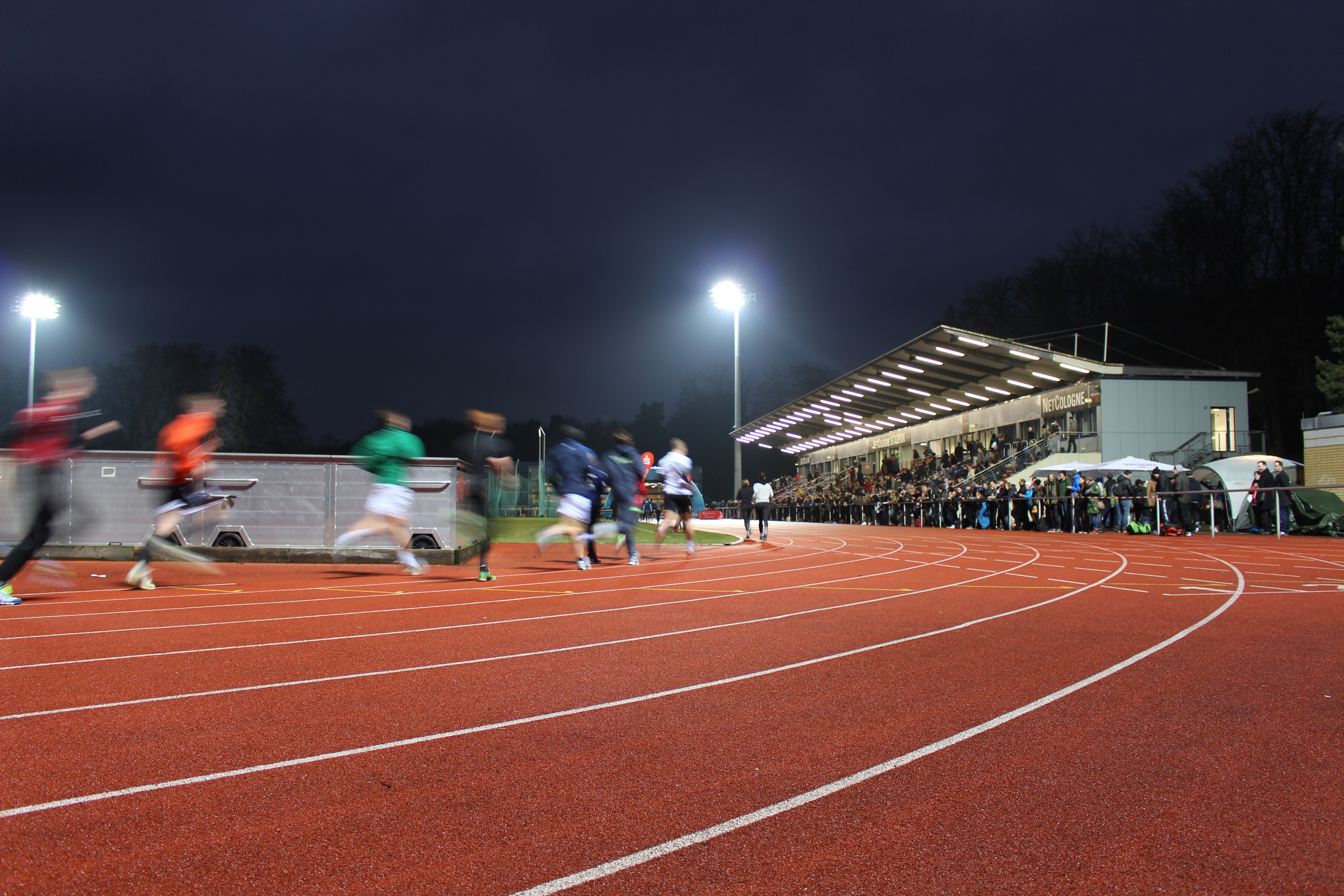 Ausdauerlauf bei der Sporteignungsprüfung